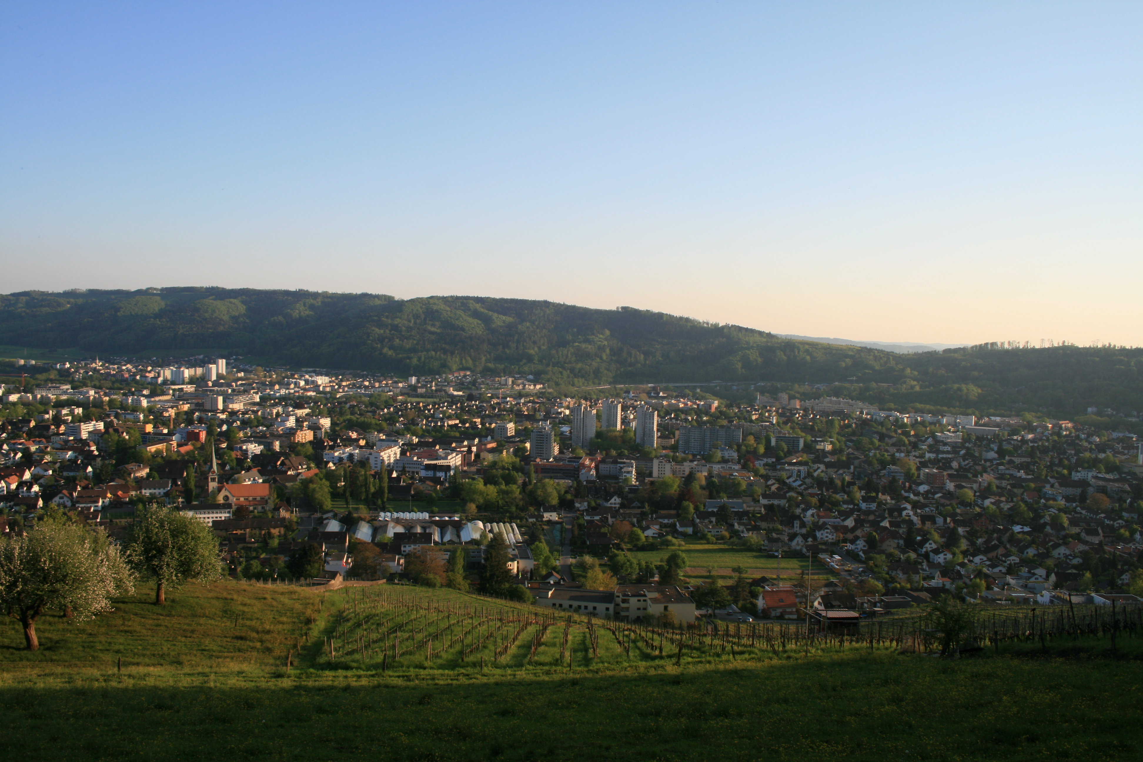 Blick auf Wettingen von der Lägern aus